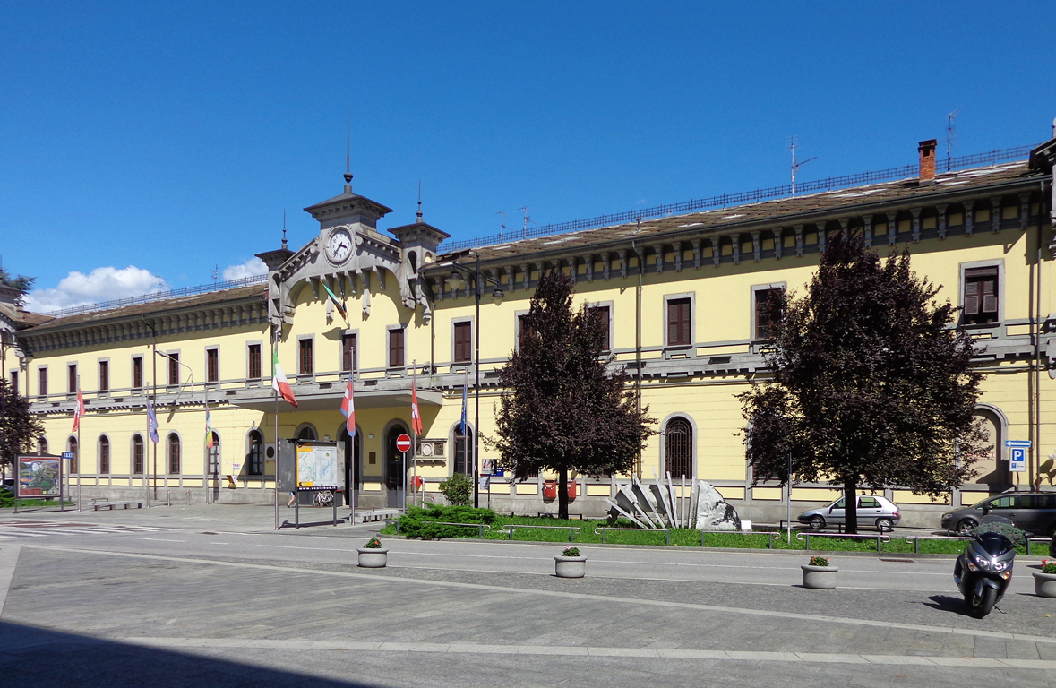 Stazione ferroviaria di Domodossola